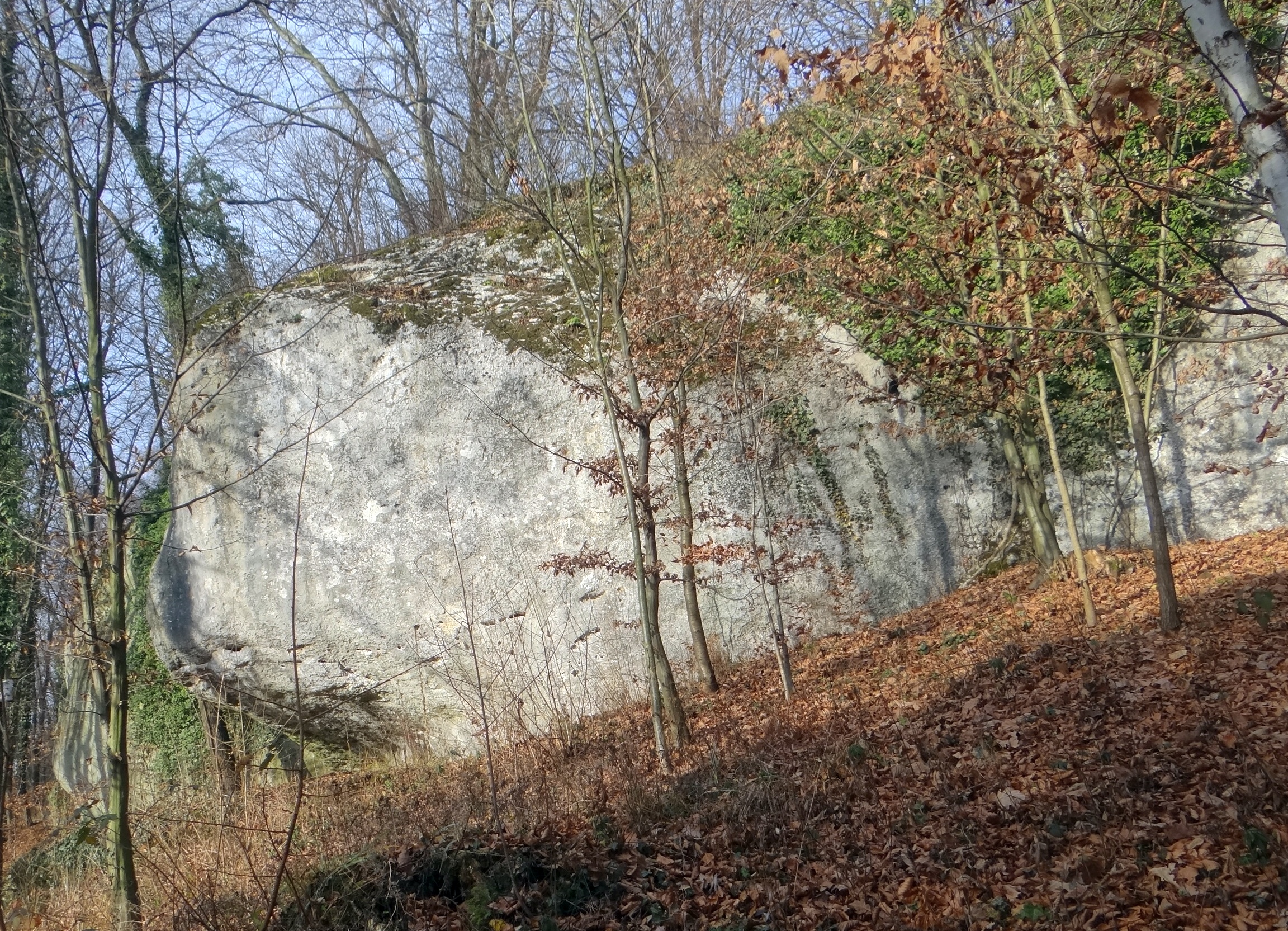 Mały Mur w Zimnym Dole (Czułów)